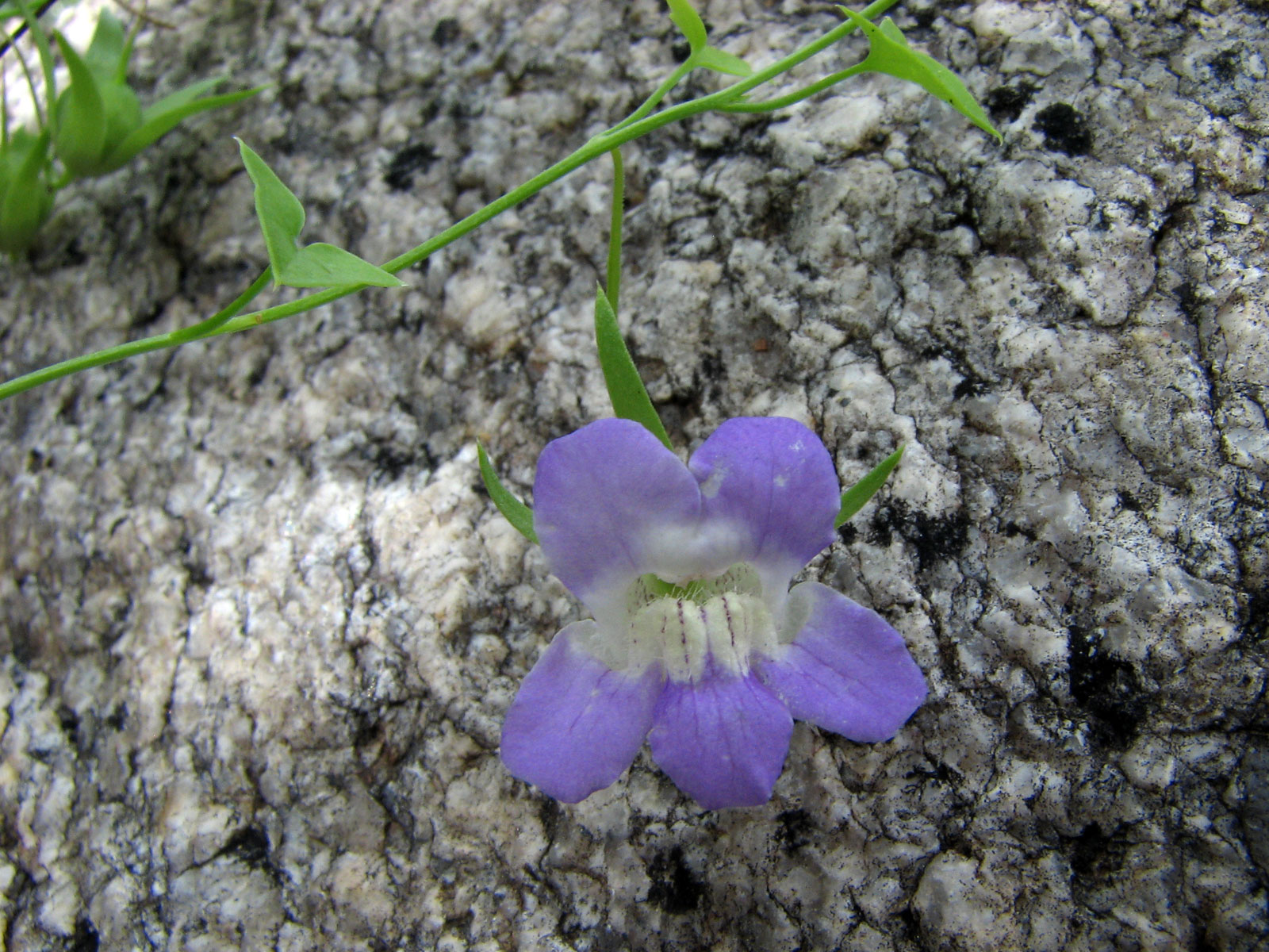 Maurandella antirrhiniflora, also sometimes called Roving Sailor. Molino Basin, Santa Catalina Mountains, Pima County, Arizona, USA. 9 August 2008.